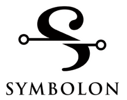 Signet von Symbolon, der Gesellschaft für wissenschaftliche Symbolforschung e.V.